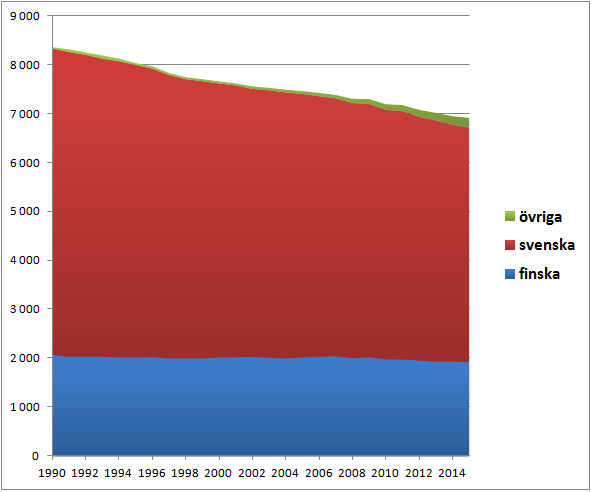 Kimitöns befolkning uppdelad efter språktillhörighet, 1990-2015. Under perioden minskade den svenska befolkningen signifikant i antal medan de finsktalandes antal förblev kring 2000 personer. Källa: Statistikcentralen [1]